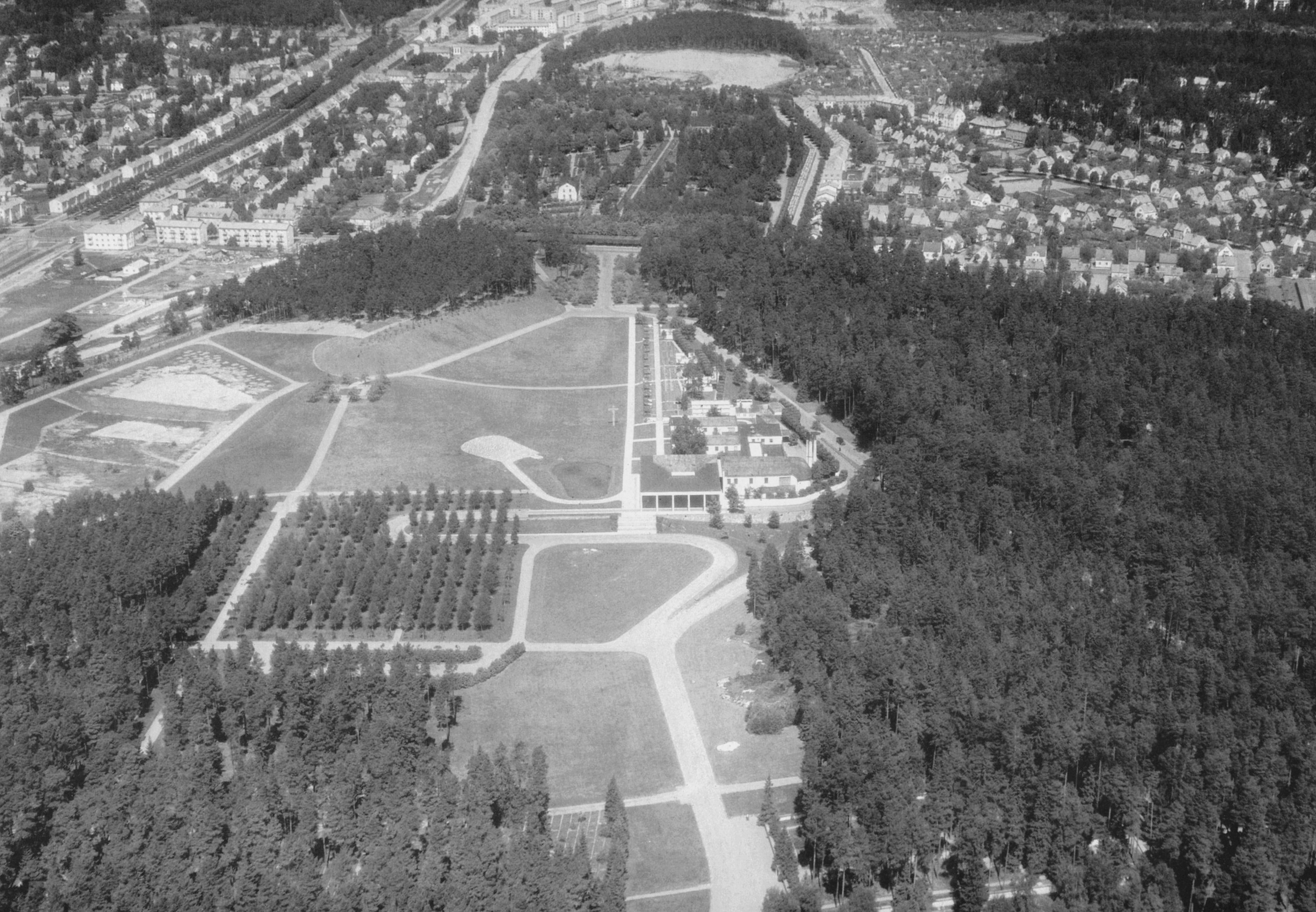 Skogskyrkogården i Stockholm, vy mot norr